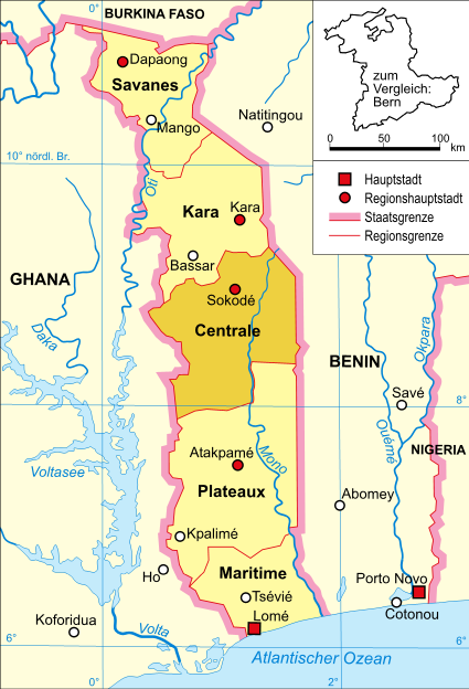 Politische Karte Togos (Region Centrale hervorgehoben)